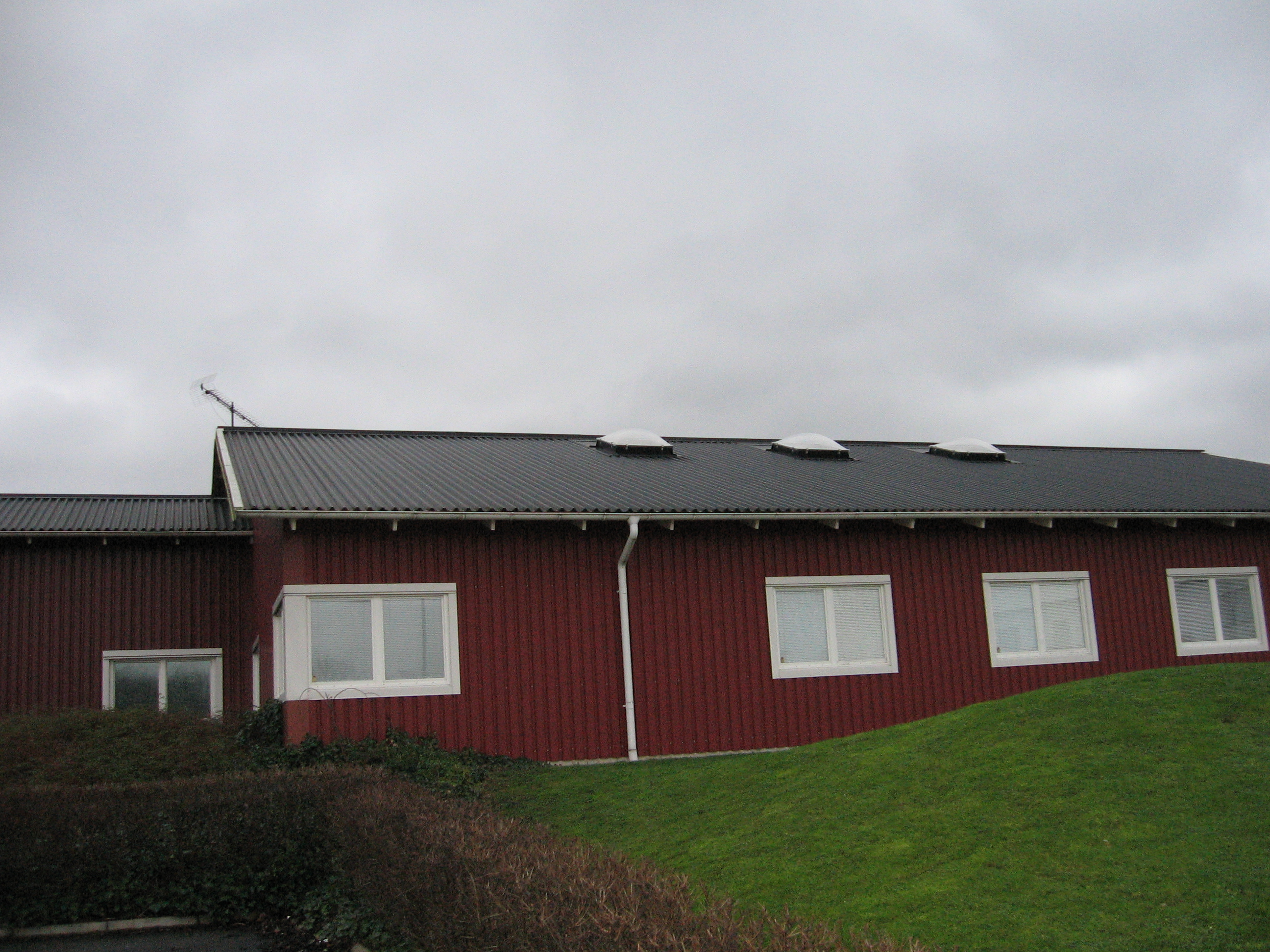 Riksantikvarieämbetet i Lund. Avdelningen för arkeologiska undersökningar, UV Syd.